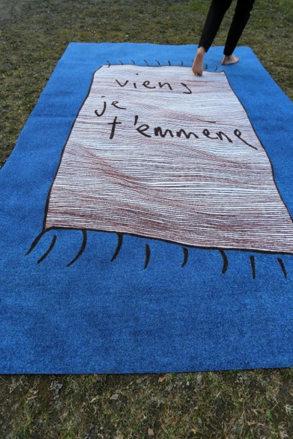 Oeuvre de Marie Antoinette Gorret, Exposition 2018